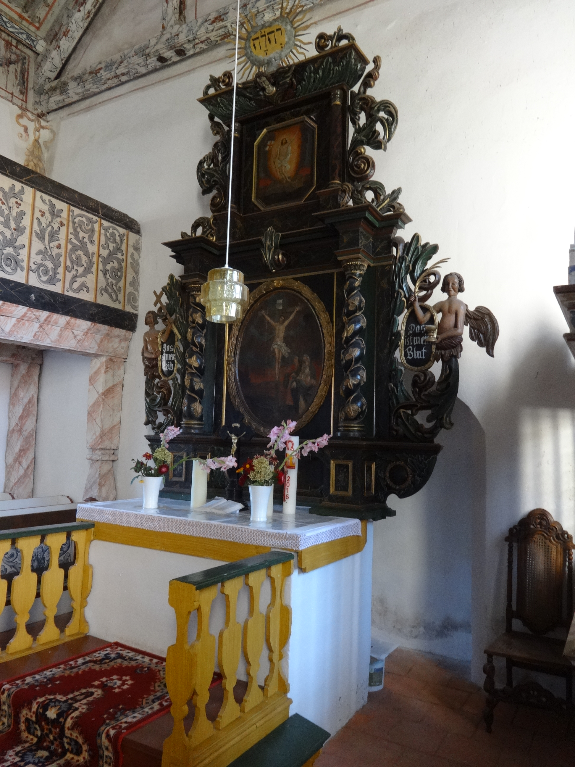 Die evangelische Dorfkirche Prensdorf ist ein Sakralbau in Prensdorf, einem Ortsteil der Gemeinde Dahmetal im Landkreis Teltow-Fläming in Brandenburg.